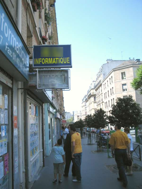 Paris, rue Montgallet, Juillet 2005. Montgallet street, July 2005.